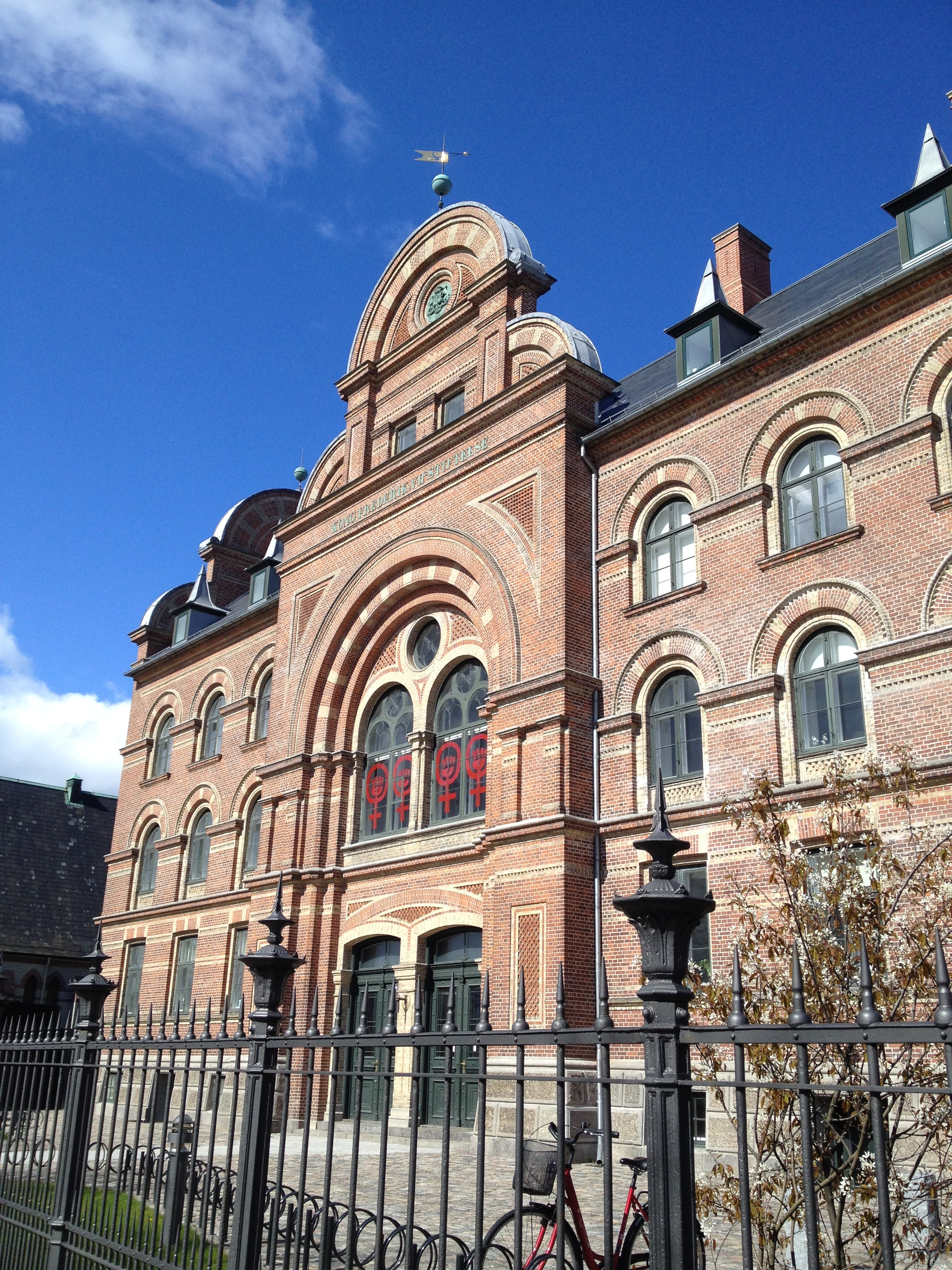 Dannerhuset in Copenhagen, Denmark